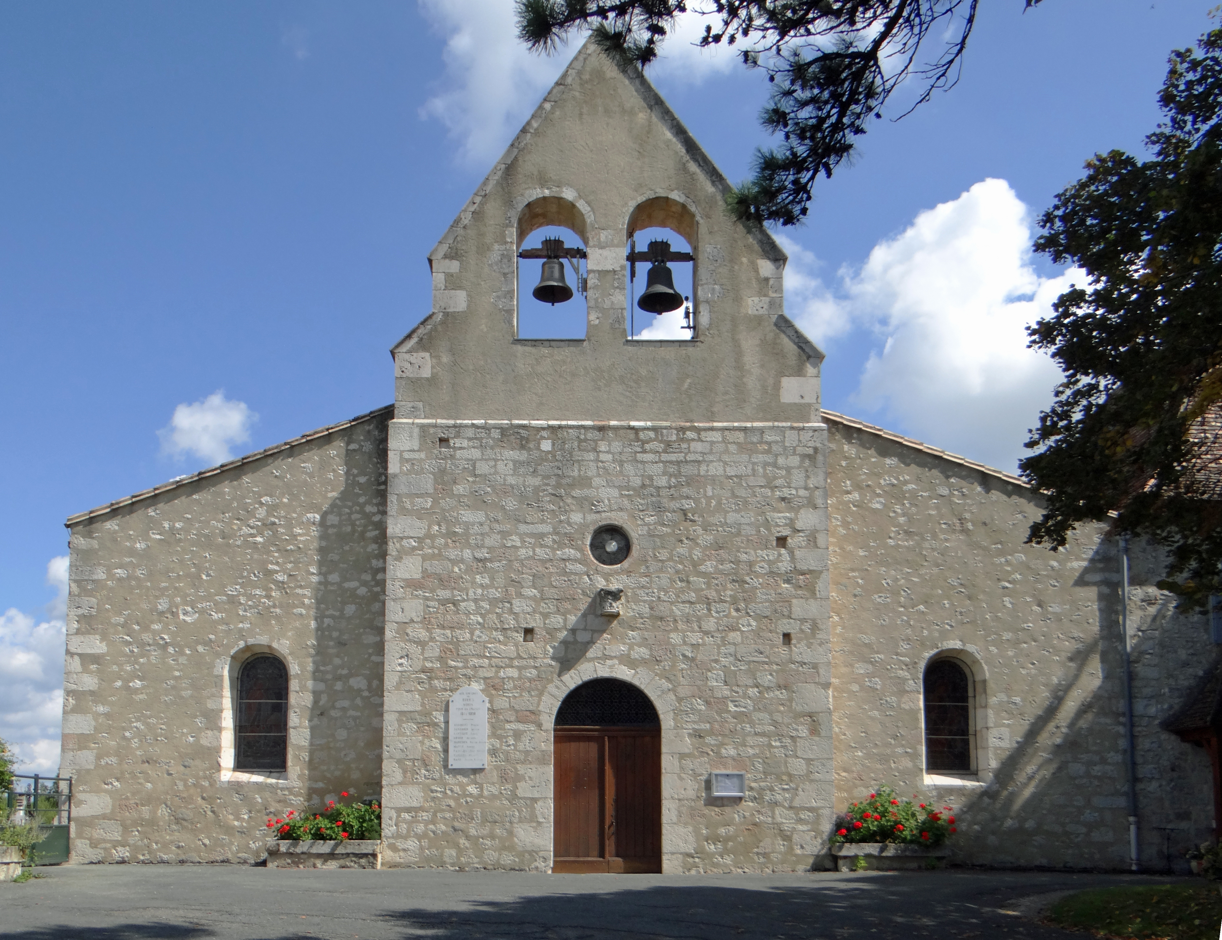 Rives - Église Saint-Pierre-ès-Liens - Façade occidentale .